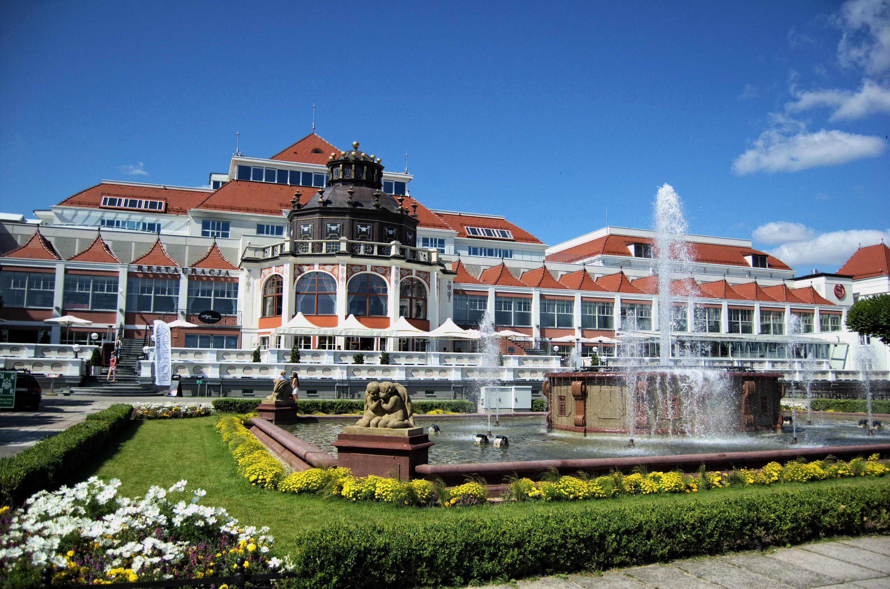 Sopot, ogród zdrojowy, ob. skwer, kon. XIX, 1910